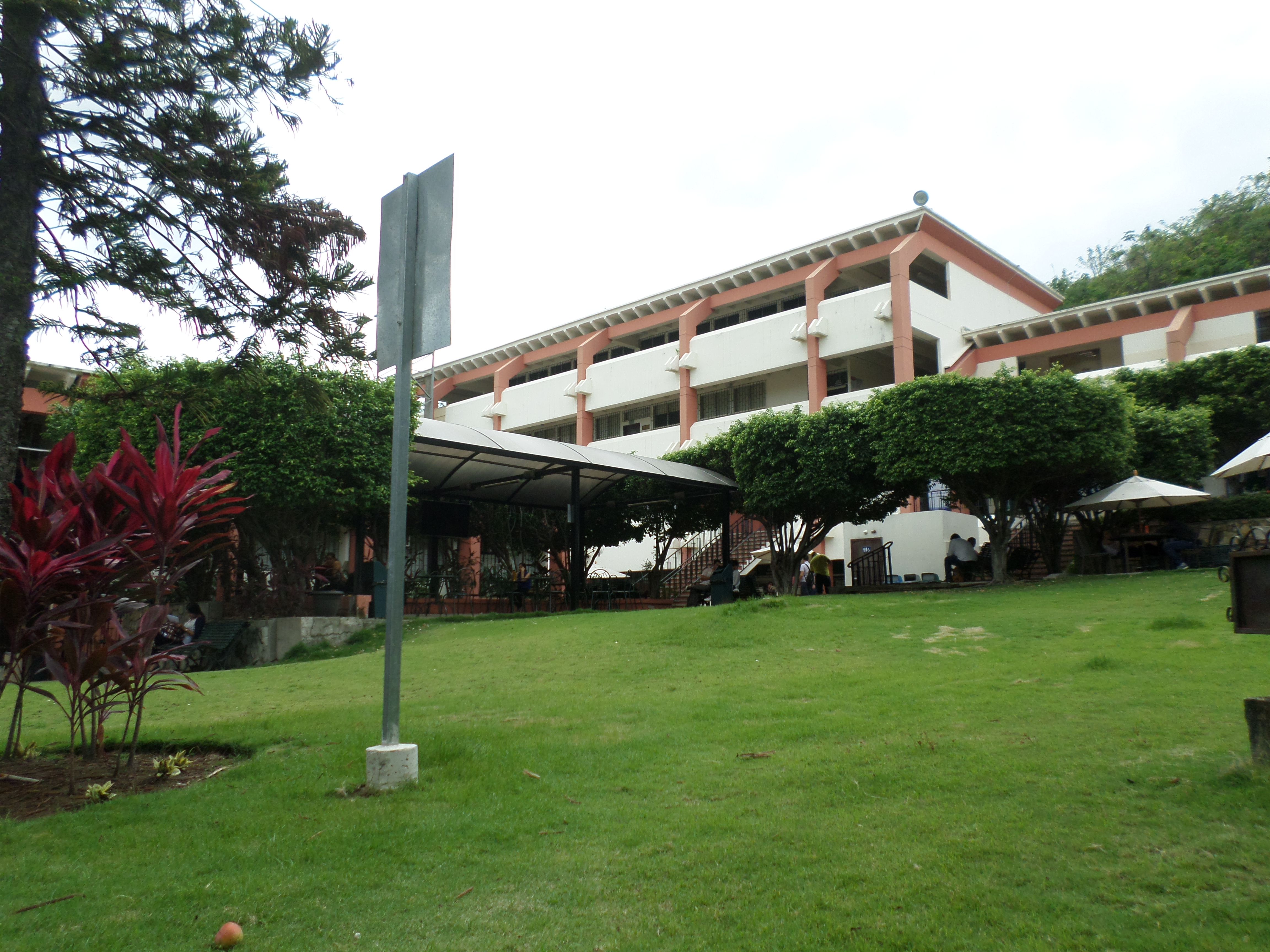 filosofia